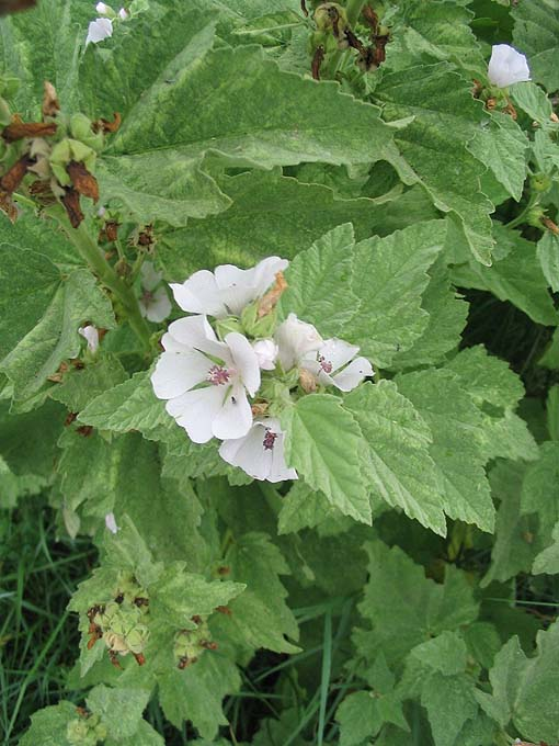 Althaea officinalis (guimauve officinale) ; Photo prise au Bec d'Andaine (50) en août 2004 ; Jean Tosti 08/2004